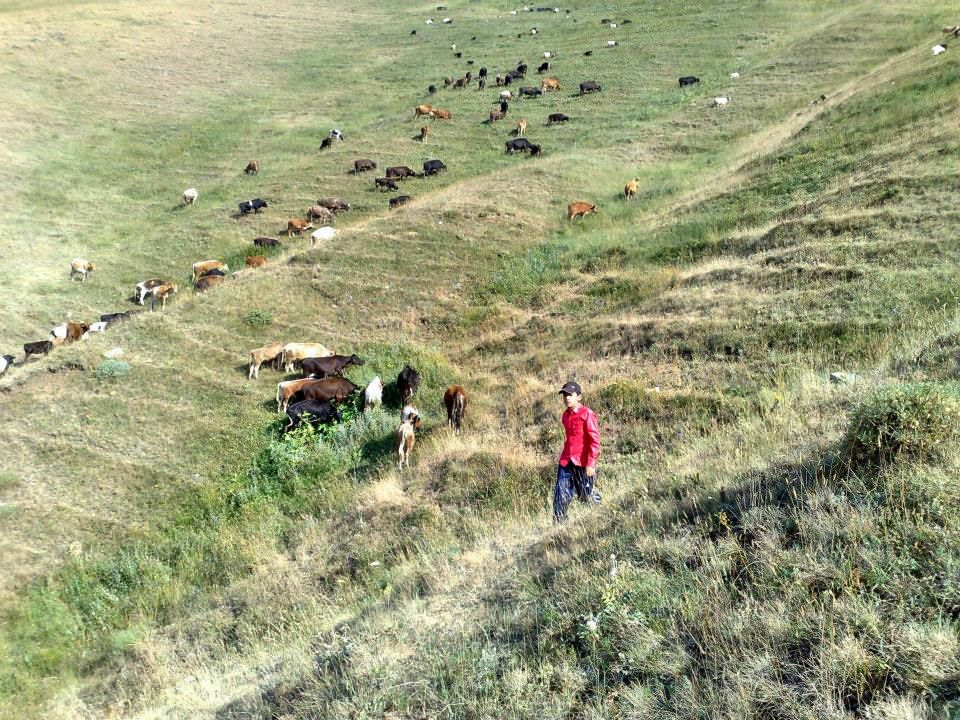 دامپروري در مراتع خان كندي